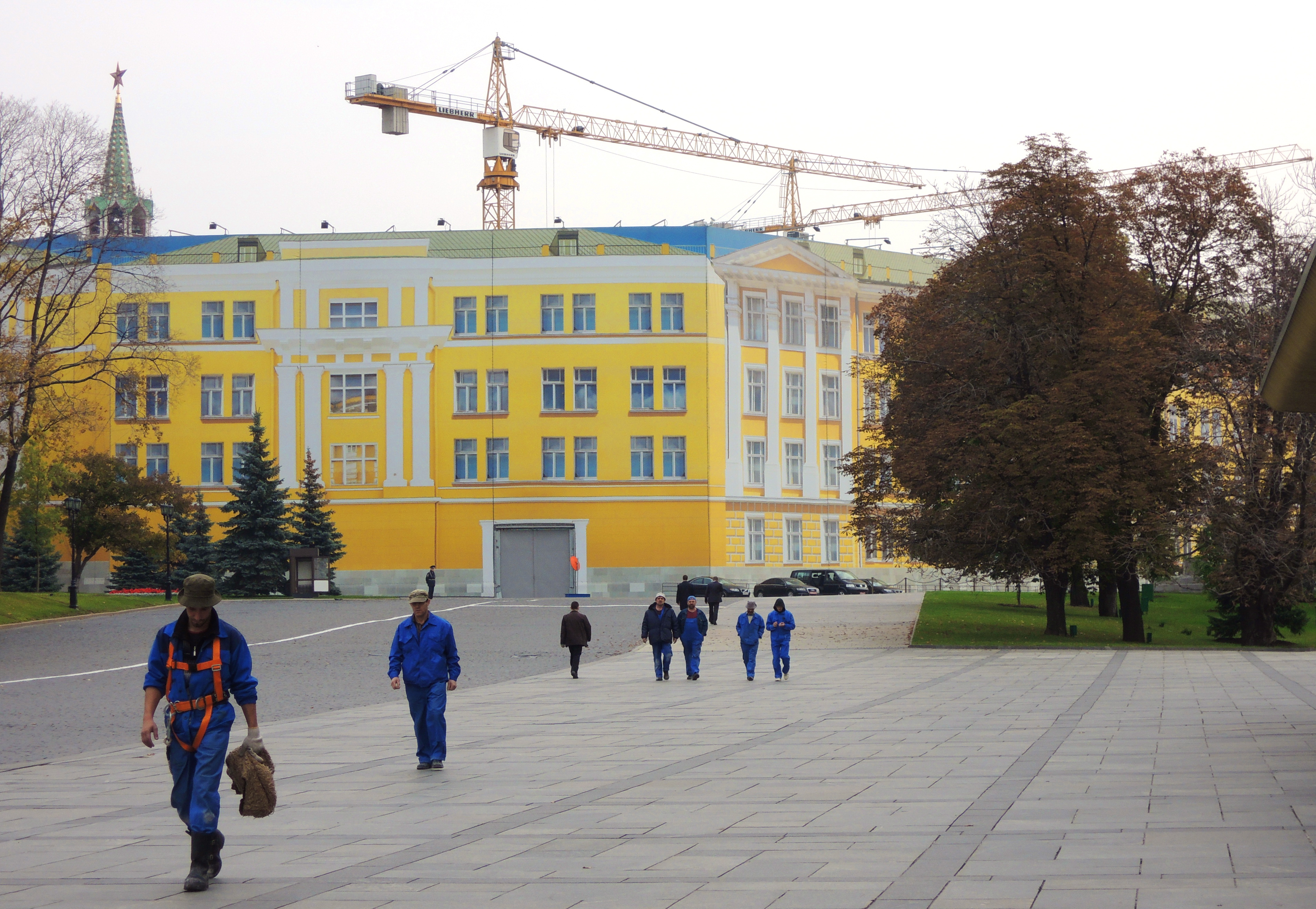 14-й корпус Московского Кремля